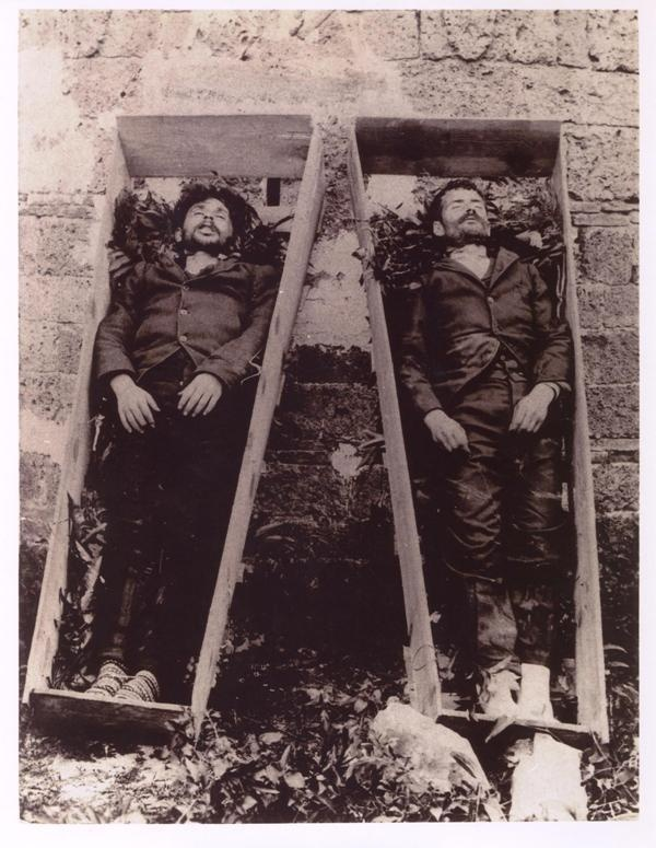 Аграс (ляво) и Мингас (дясно) в ковчези